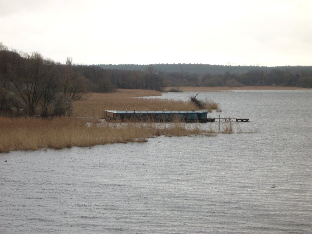 the Lake "Schwielowsee" (River Havel)in Brandenburg (Germany) - der Schwielowsee, von der Baumgartenbrücke gesehen